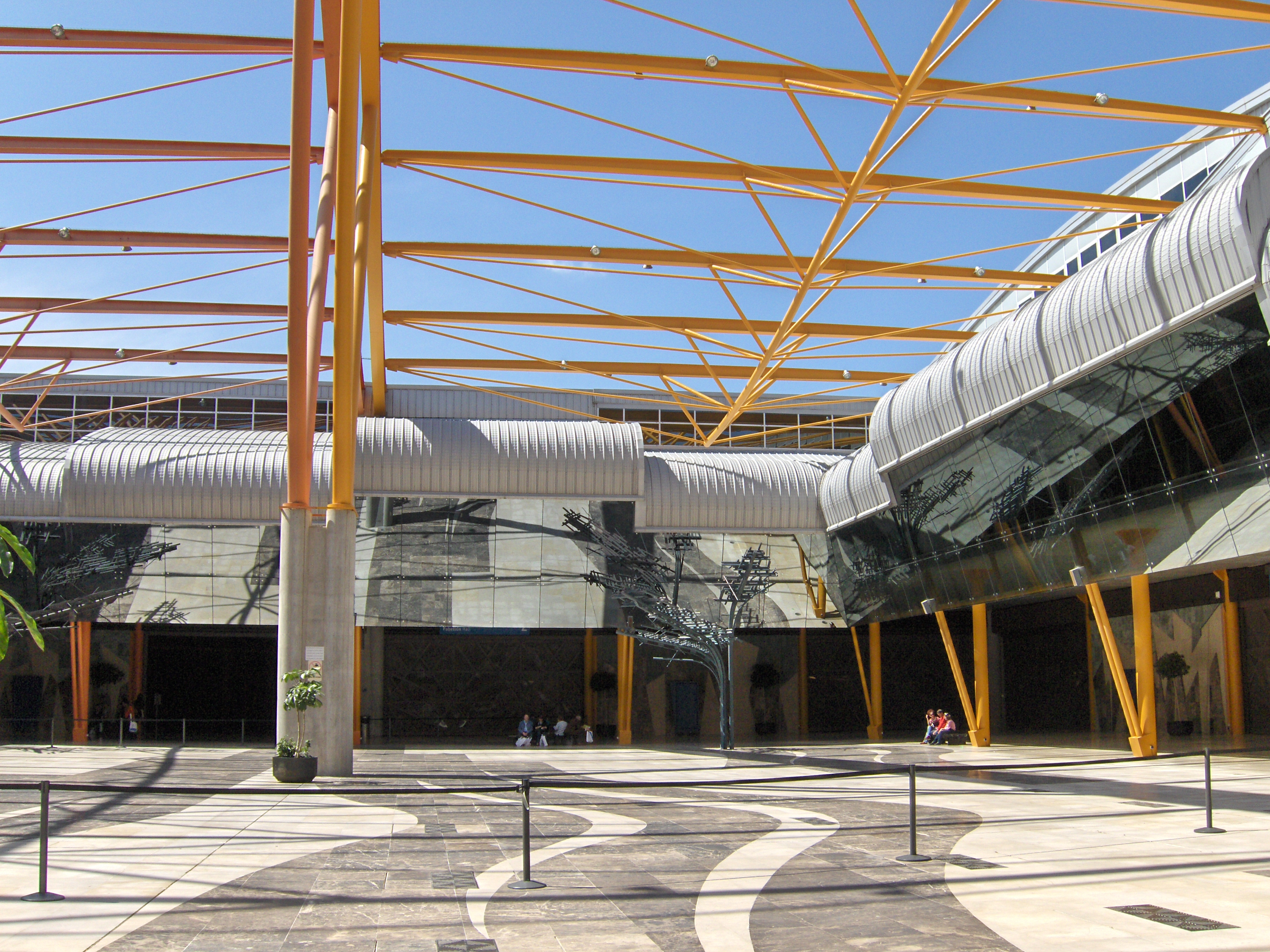 Patio interior del Palacio e Ferias y Congresos de Málaga, España.